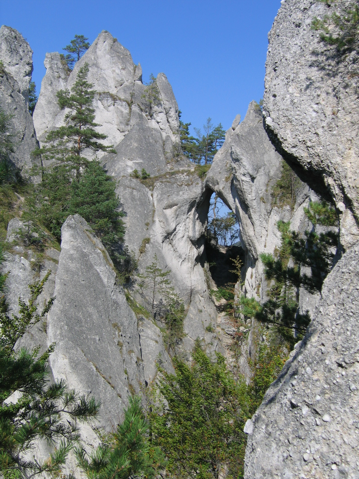 sk: Súľovské skaly, útvar Gotická brána, Slovensko, sept 2006 en: Súľov rocks, Slovakia sept 2006 author:Juloml